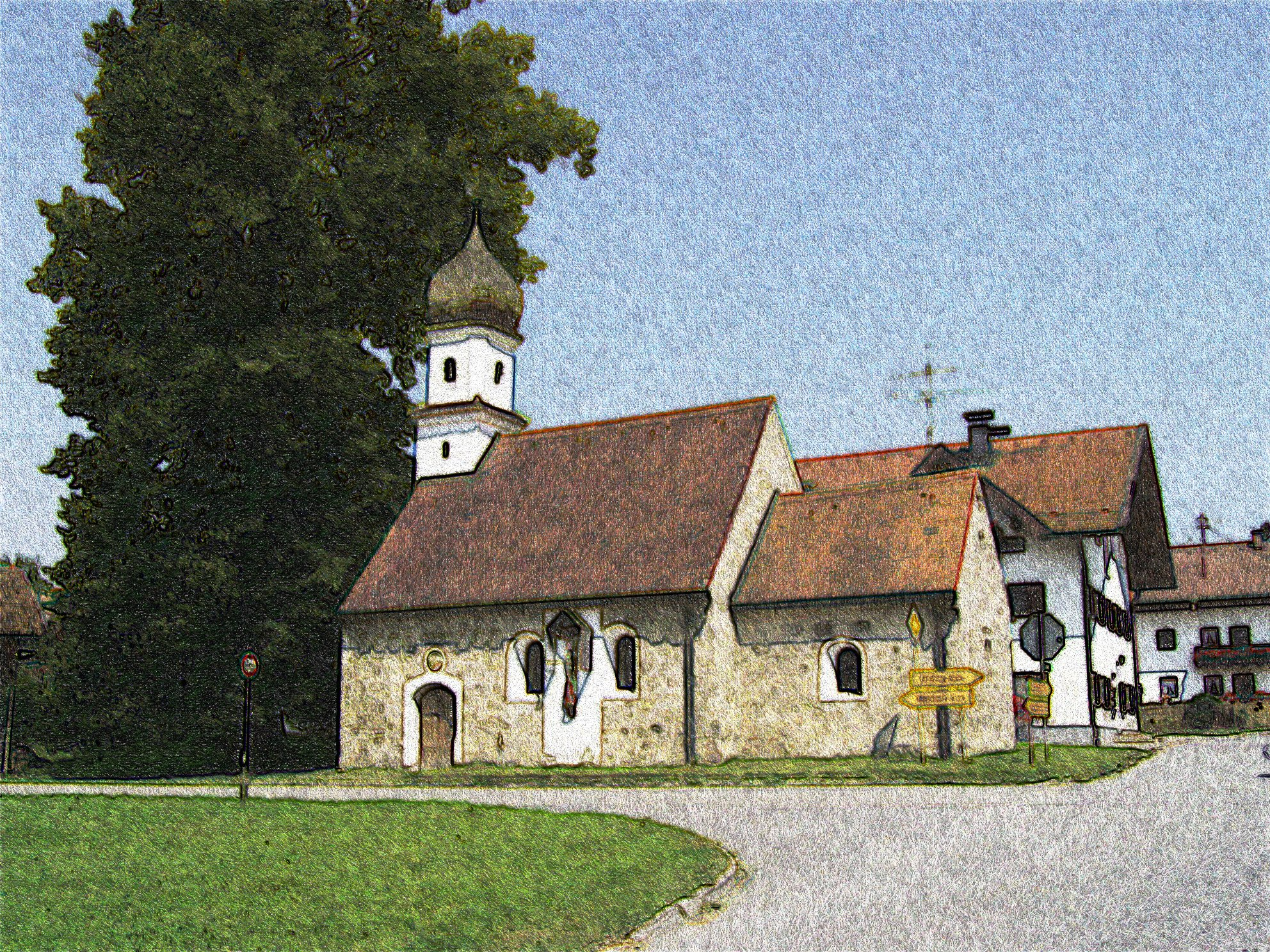 Kirche in Taglaching, Bruck